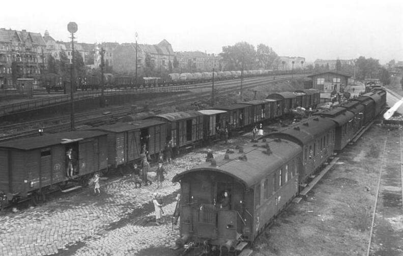 ADN-ZB Berlin 1946 Pankower Güterbahnhof: Umsiedler benutzen für ihren Weitertransport die Eisenbahn.